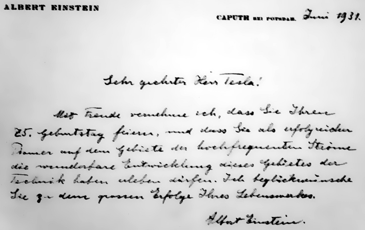 Pismo Alberta Einsteina Nikoli Tesli